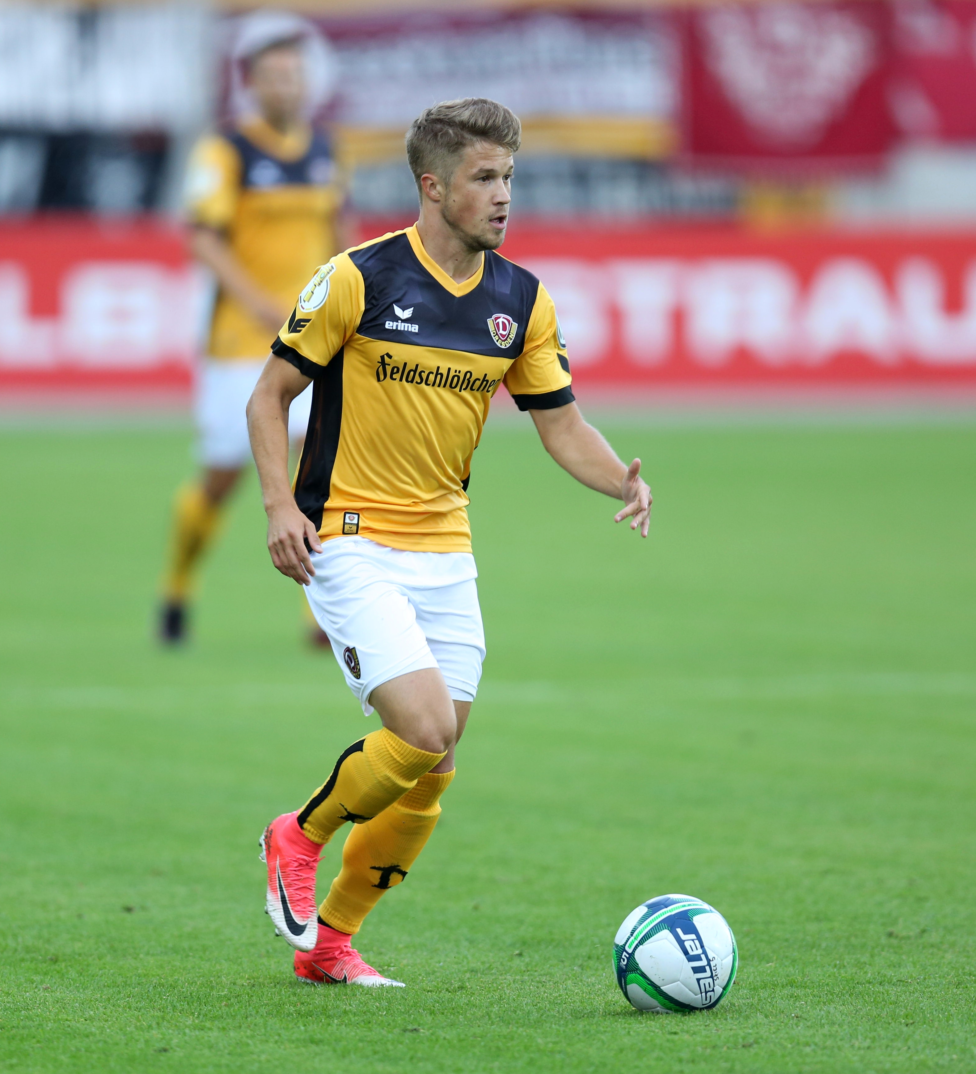 DFB-Pokal 2017/18, 1. Hauptrunde, TuS Koblenz gegen SG Dynamo Dresden: Patrick Möschl (SG Dynamo Dresden)